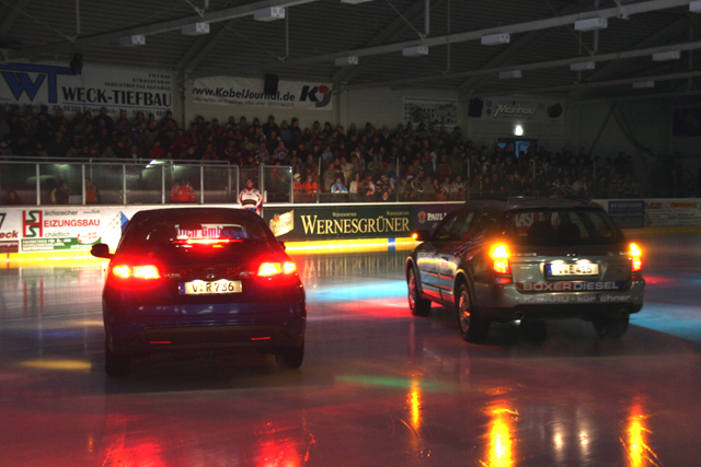 Innenansicht